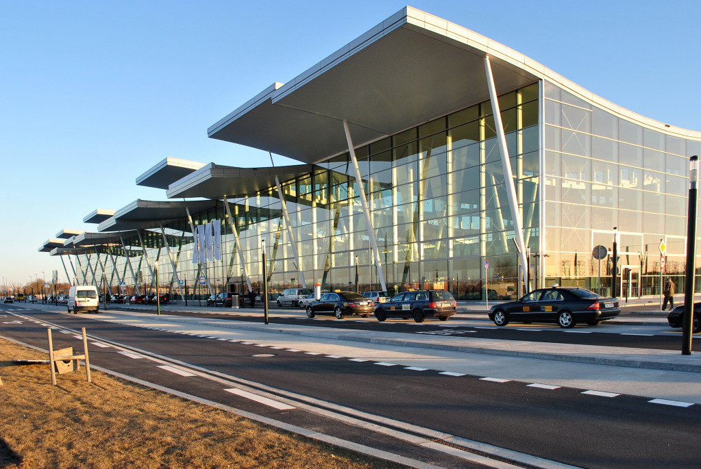 Terminal T2 we Wrocławiu